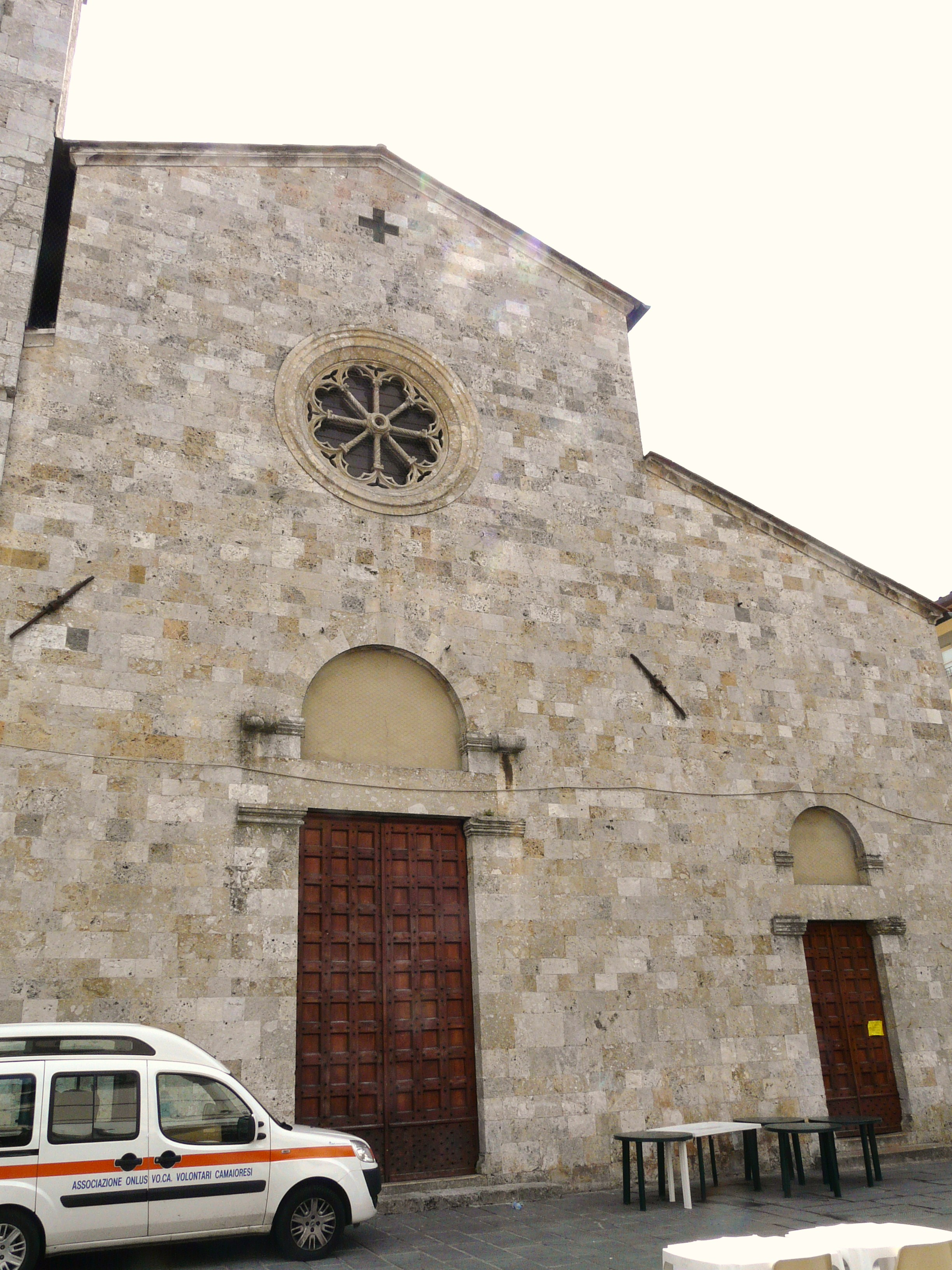 Facciata della collegiata di Santa Maria Assunta, Camaiore, Toscana, Italia